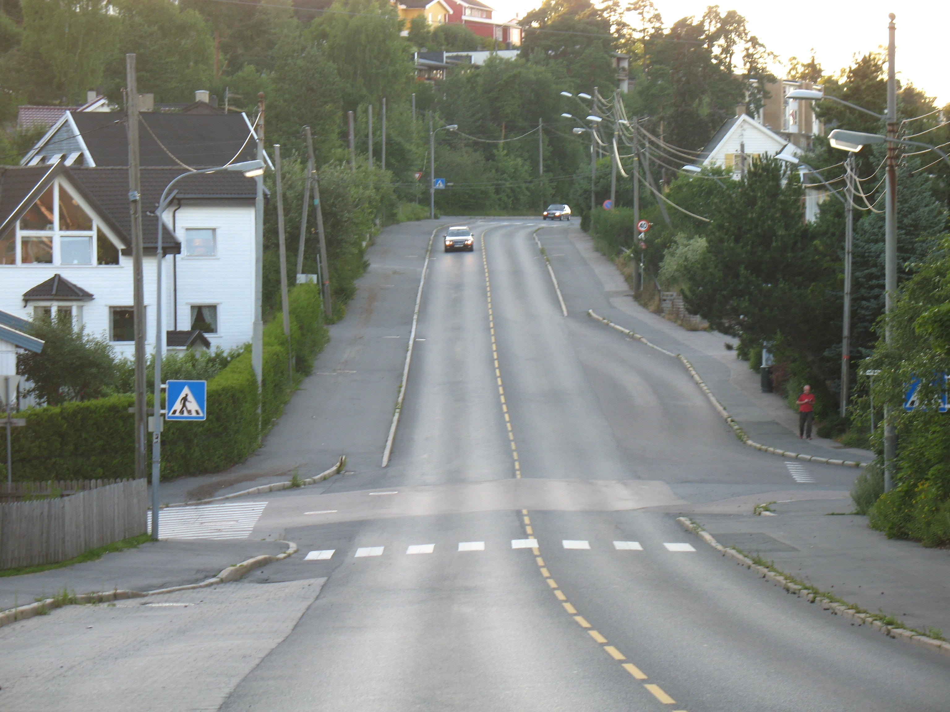 Enebakkveien på Smedberg (Abildsø) i Oslo.